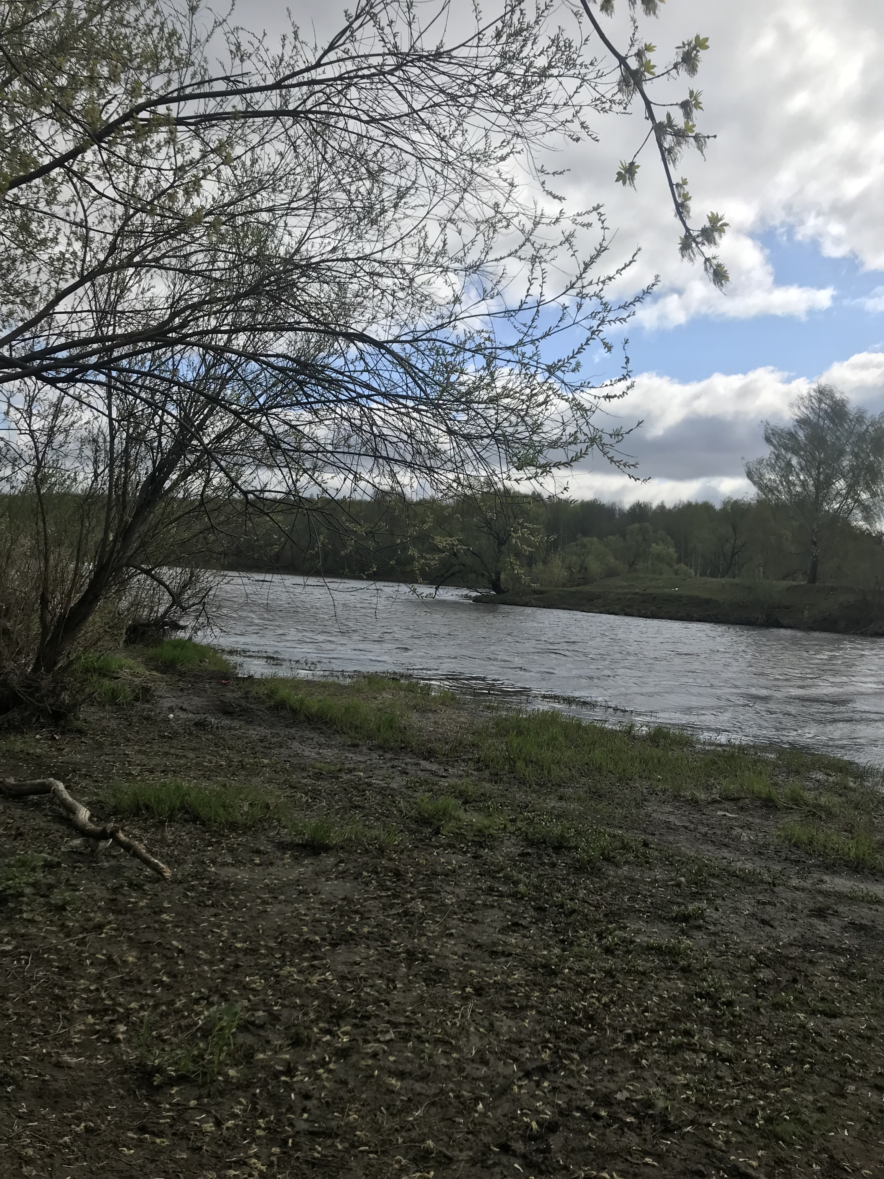 Река течёт в городе Орехово-Зуево